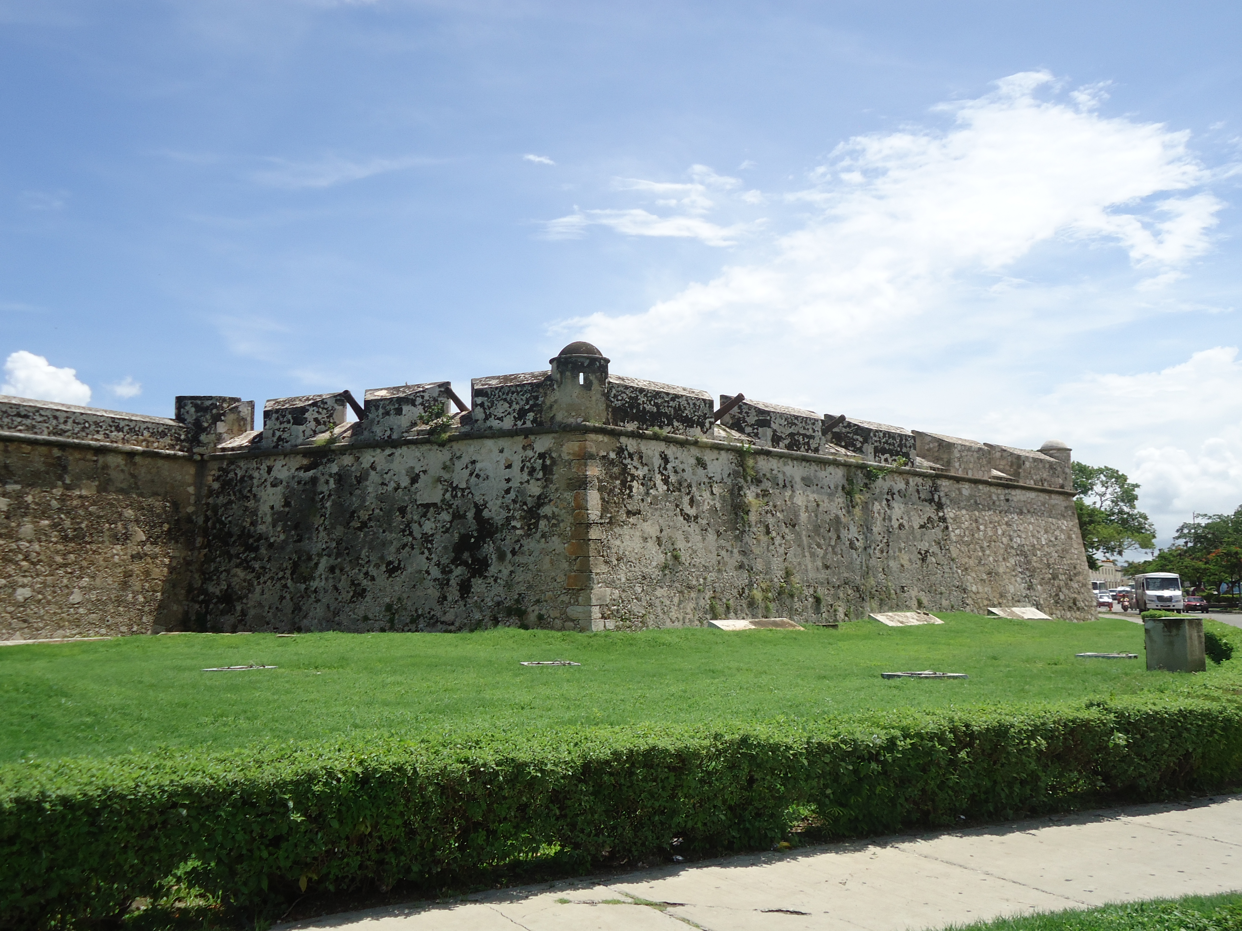 imagen del baluarte de san francisco